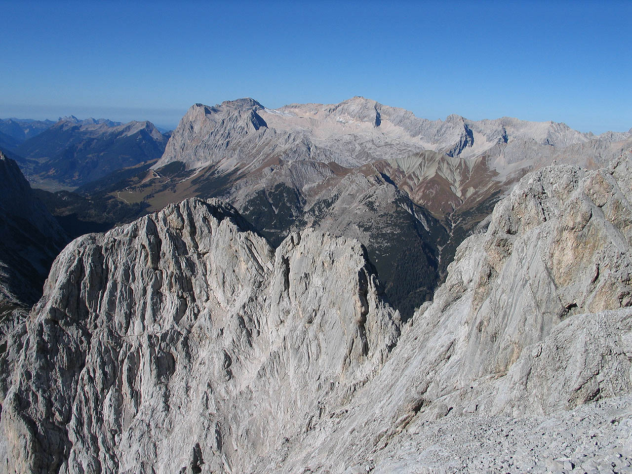 Zugspitzplatt und Zugspitze aus Richtung Süden von der Hohen Munde, Tirol, Österreich. Dazwischen Felswände der Hohen Munde und das hier tief erscheinende Hochtal Gaistal dahinter mit der ansteigenden Verwerfungszone mit Gatterlköpfen / Hoher Kamm (hier im Bild graubraun mit weniger steilem Anstieg) in der Basis des Zugspitzmassivs. Photograph: Luidger (29. Oktober 2005)